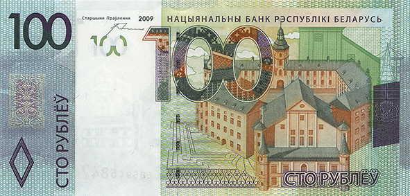 100 белорусских рублей образца 2009 года (лицевая сторона)